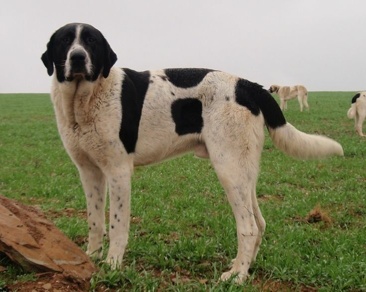 cachorro da raça Transmontano